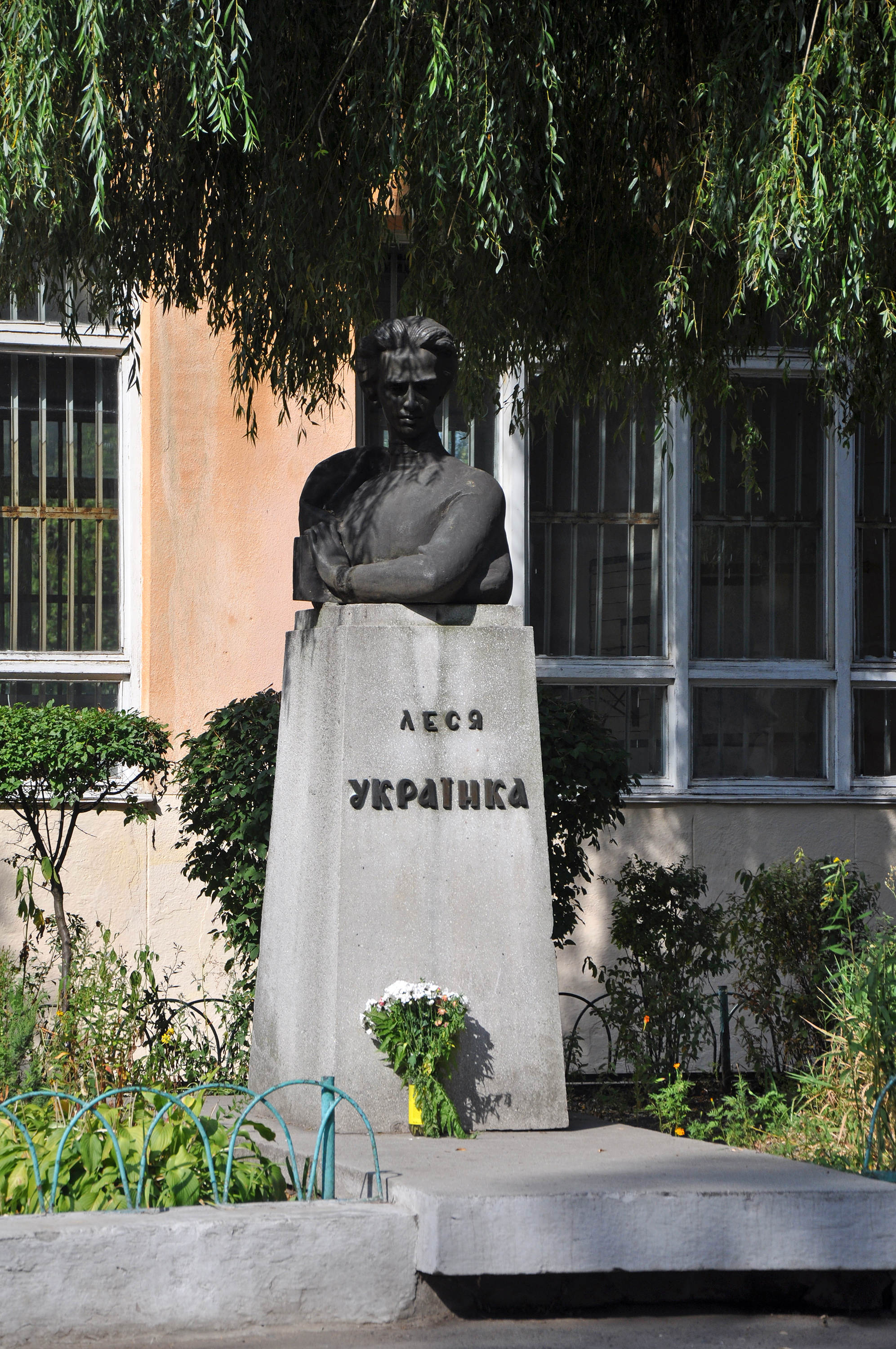 Пам'ятник Лесі Українці, українській поетесі, Львів, вул. В. Караджича, 5 (подвір'я СШ № 75)